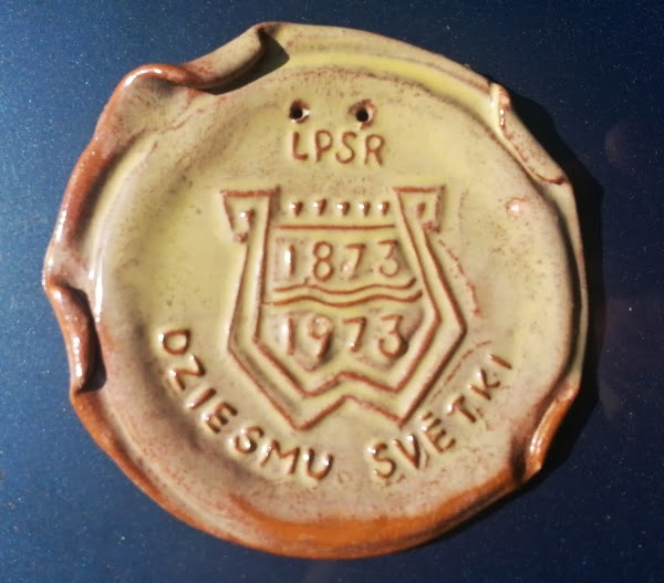 XVI Vispārējo latviešu Dziesmu svētku suvenīrs